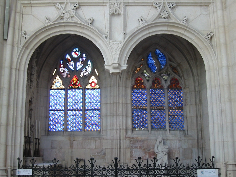 Chapelle latérale gothique flamboyante de la Basilique de Saint-Nicolas-de-Port en Lorraine.